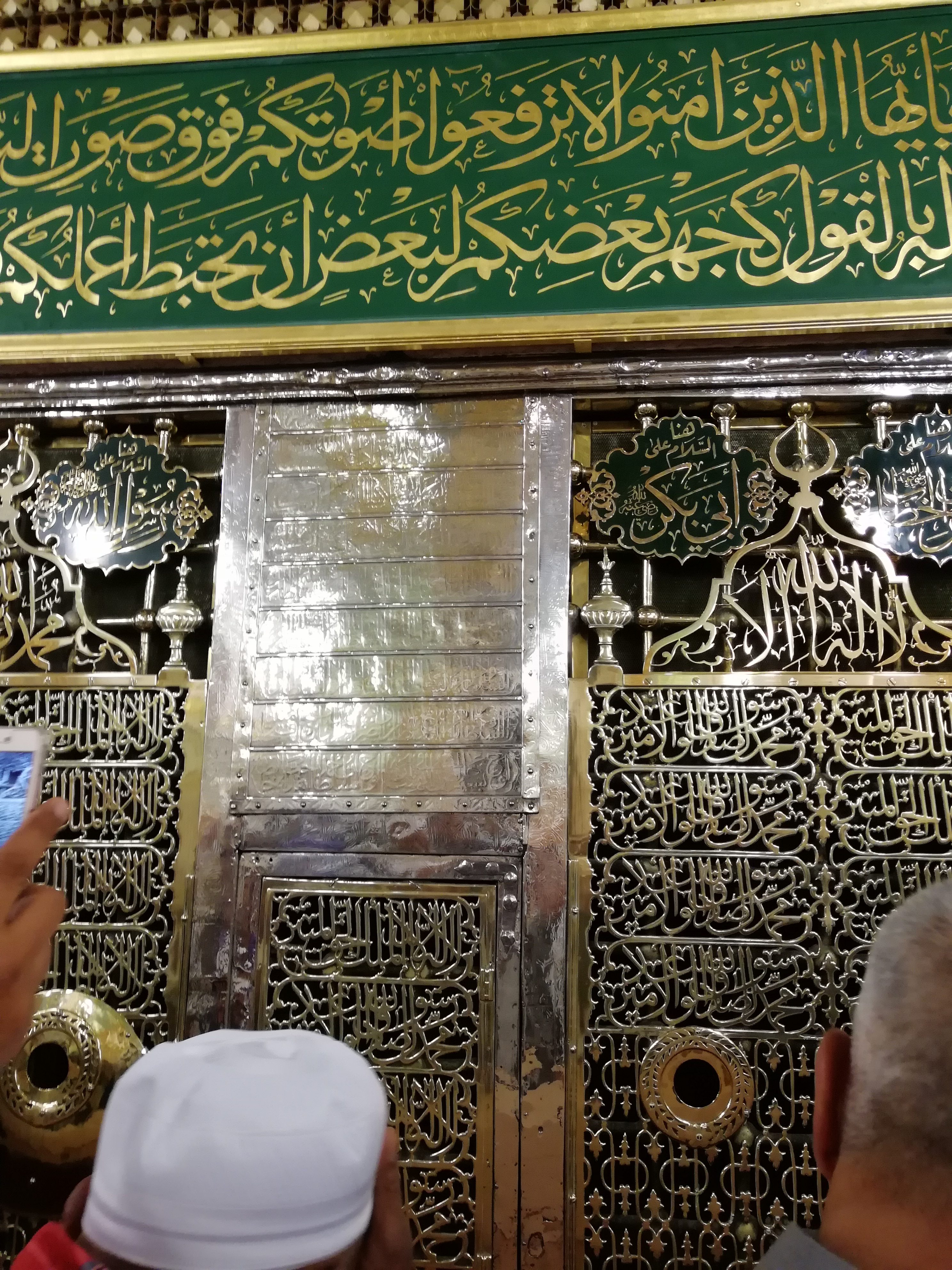 al-Madinah al-Munawarah Nabawi mosque near al-Rawda al-Sharifa Prophet Muhammad, Abu Bakr & Omar bin al-Khattab Qaitbay plate?